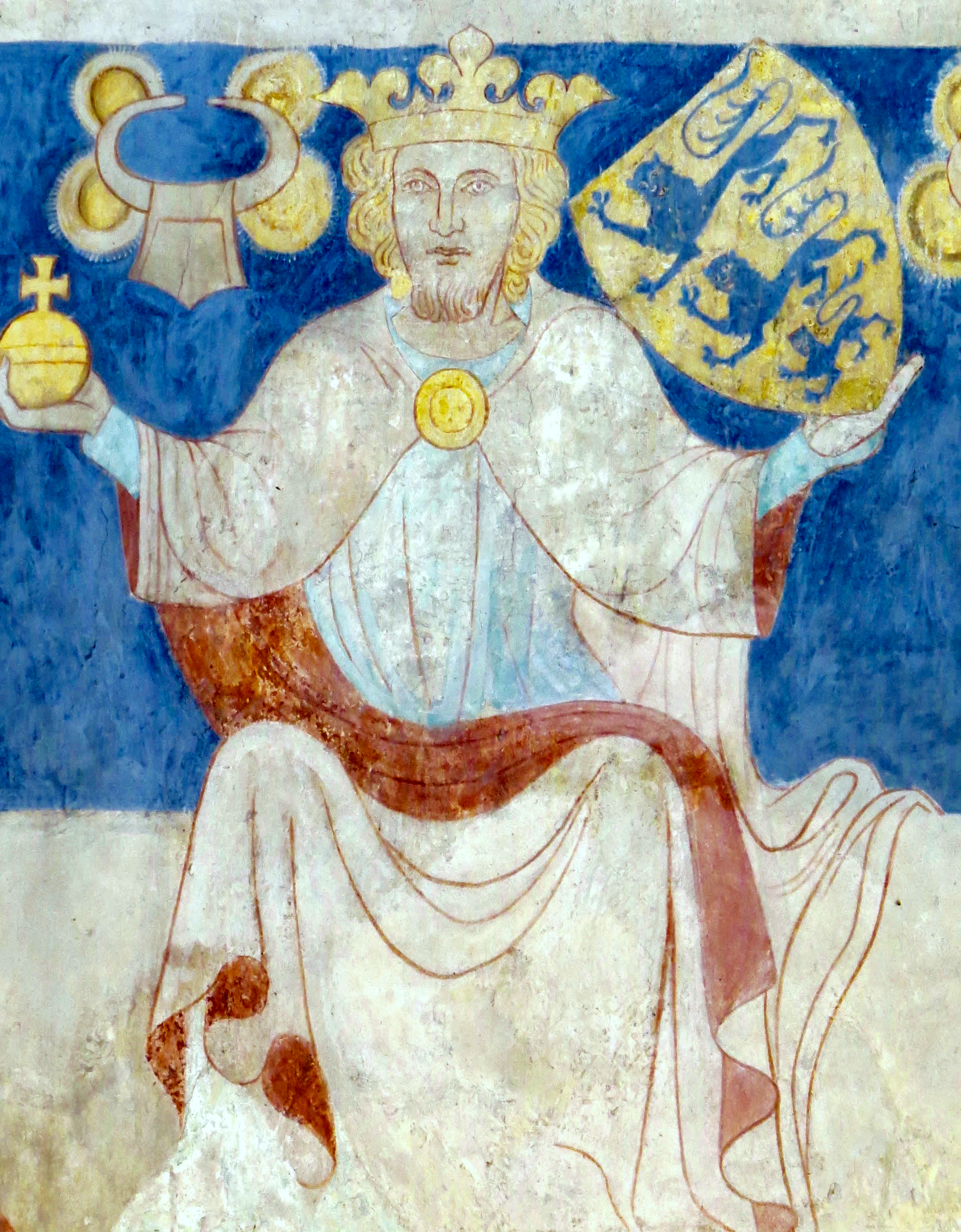 Valdemar Sejr, fra Kongefrisen i Sankt Bendts Kirke, Ringsted, Sjælland